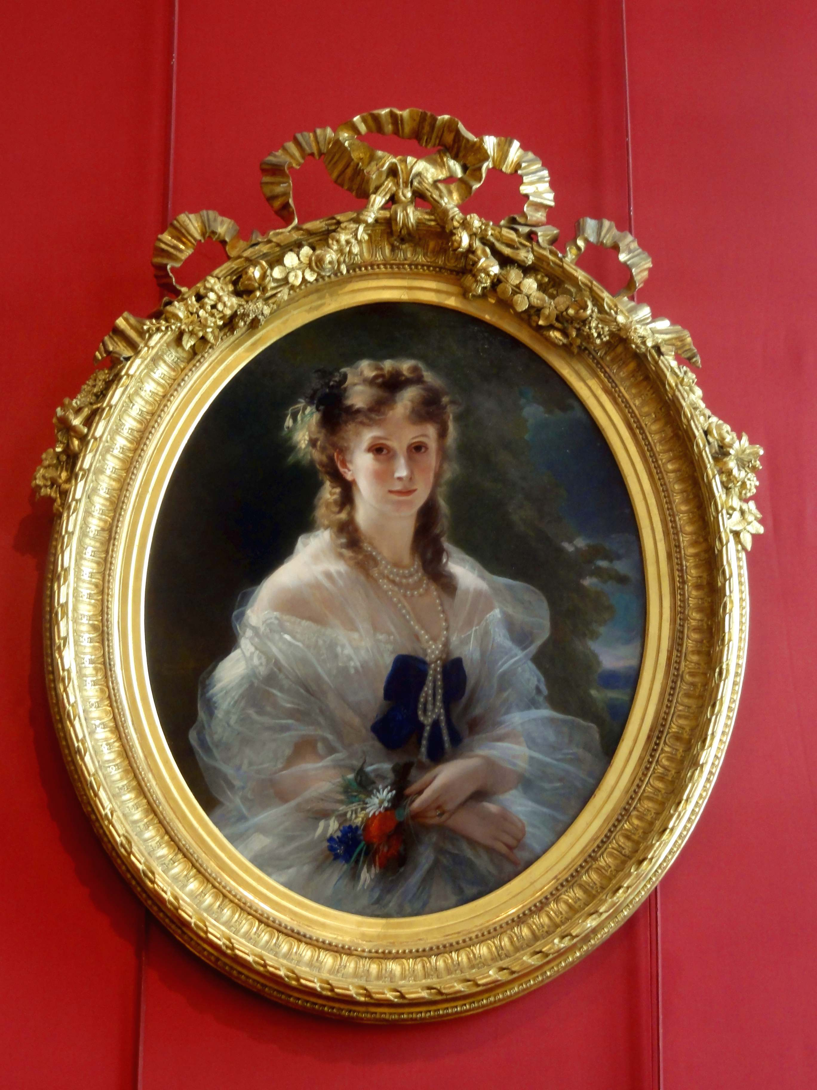 Musée du Second Empire, tableau - La Duchesse de Morny, née Sophie Troubetskoï, par Winterhalter, 1863, inv. C.53.D.76